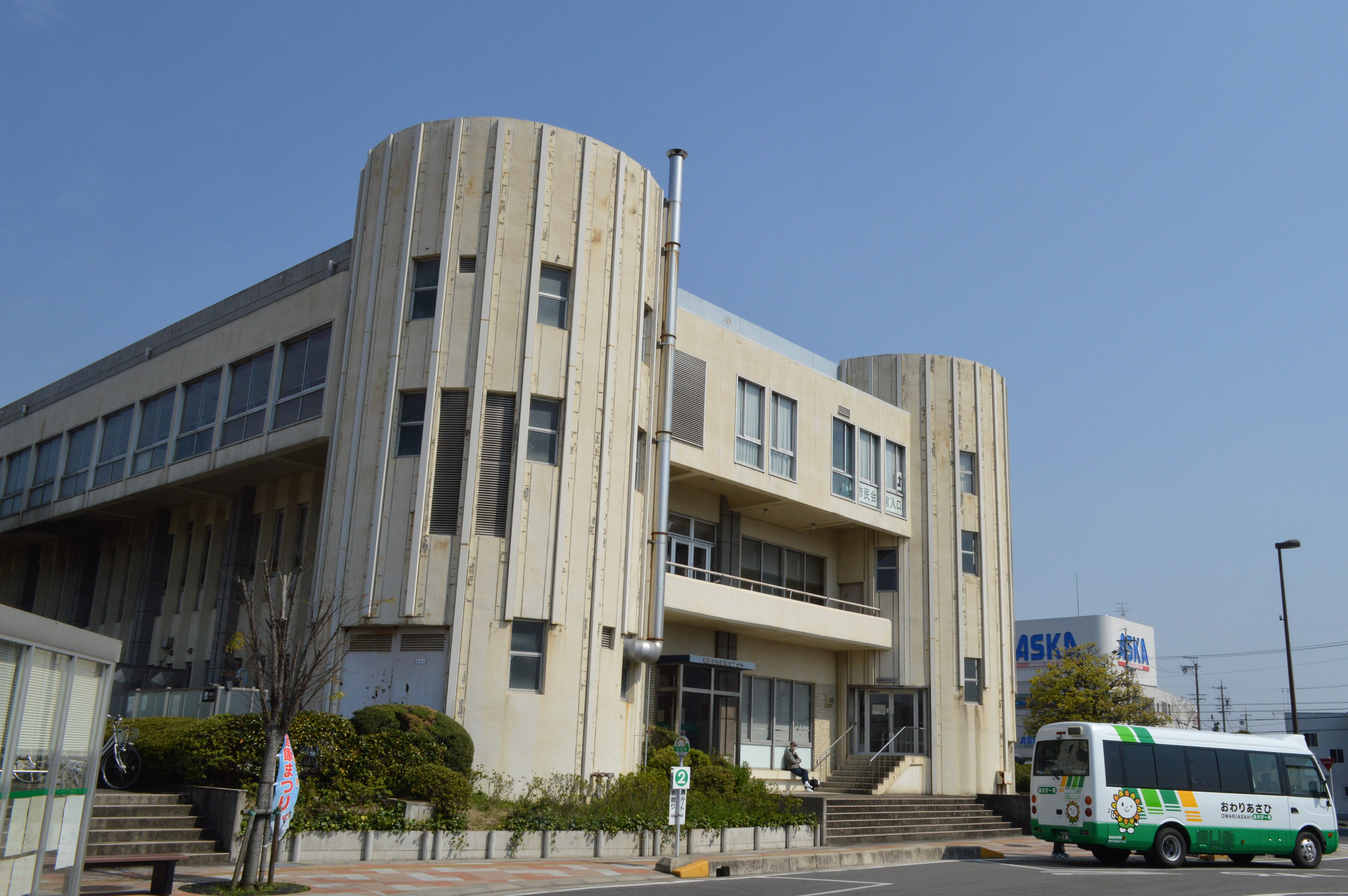 愛知県尾張旭市の尾張旭市民会館。名鉄瀬戸線尾張旭駅南すぐ、尾張旭市役所と尾張旭市総合体育館に挟まれた場所。2015年3月閉館。